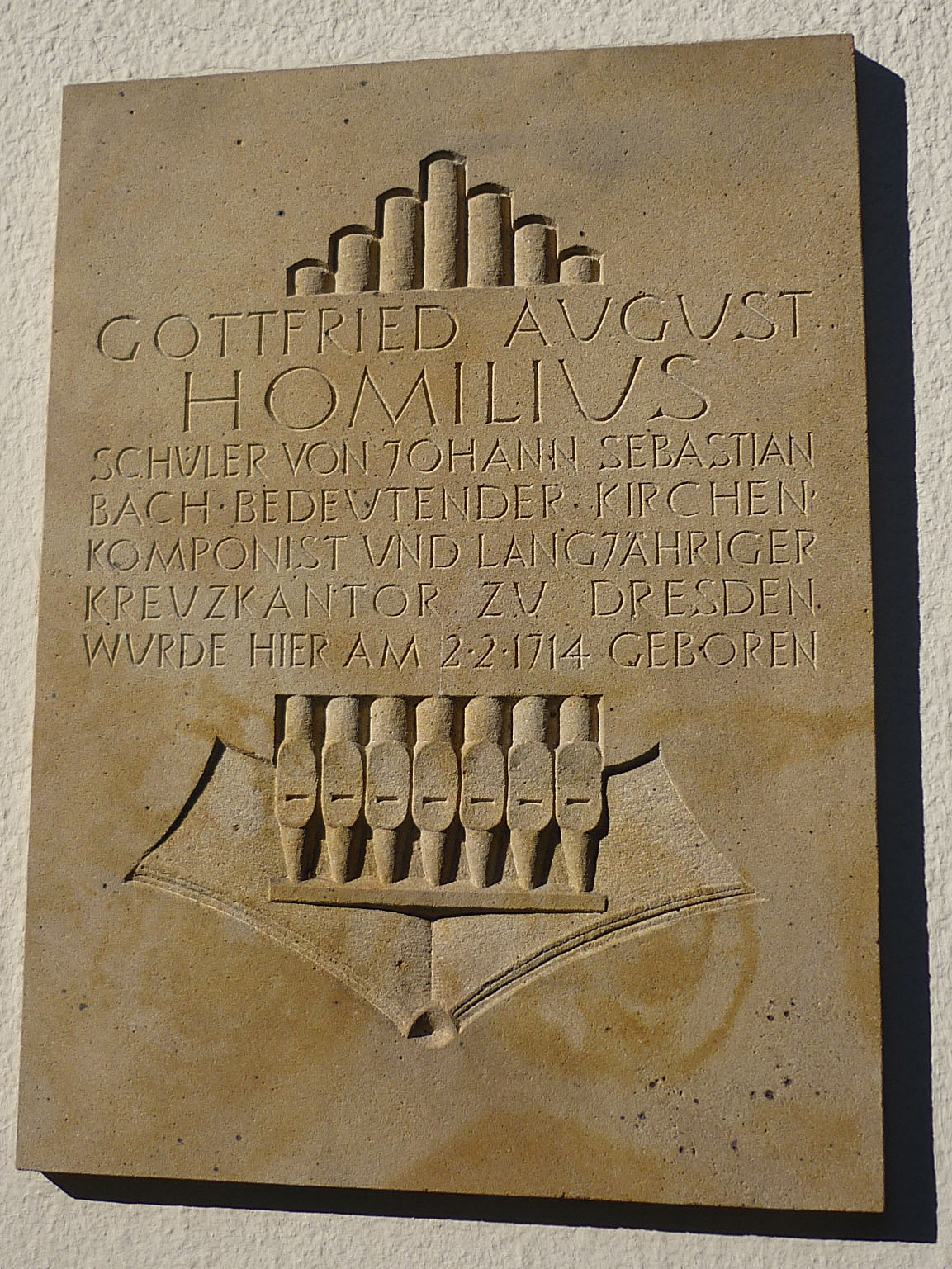 Gedenkplakette am Geburtshaus von Homilius